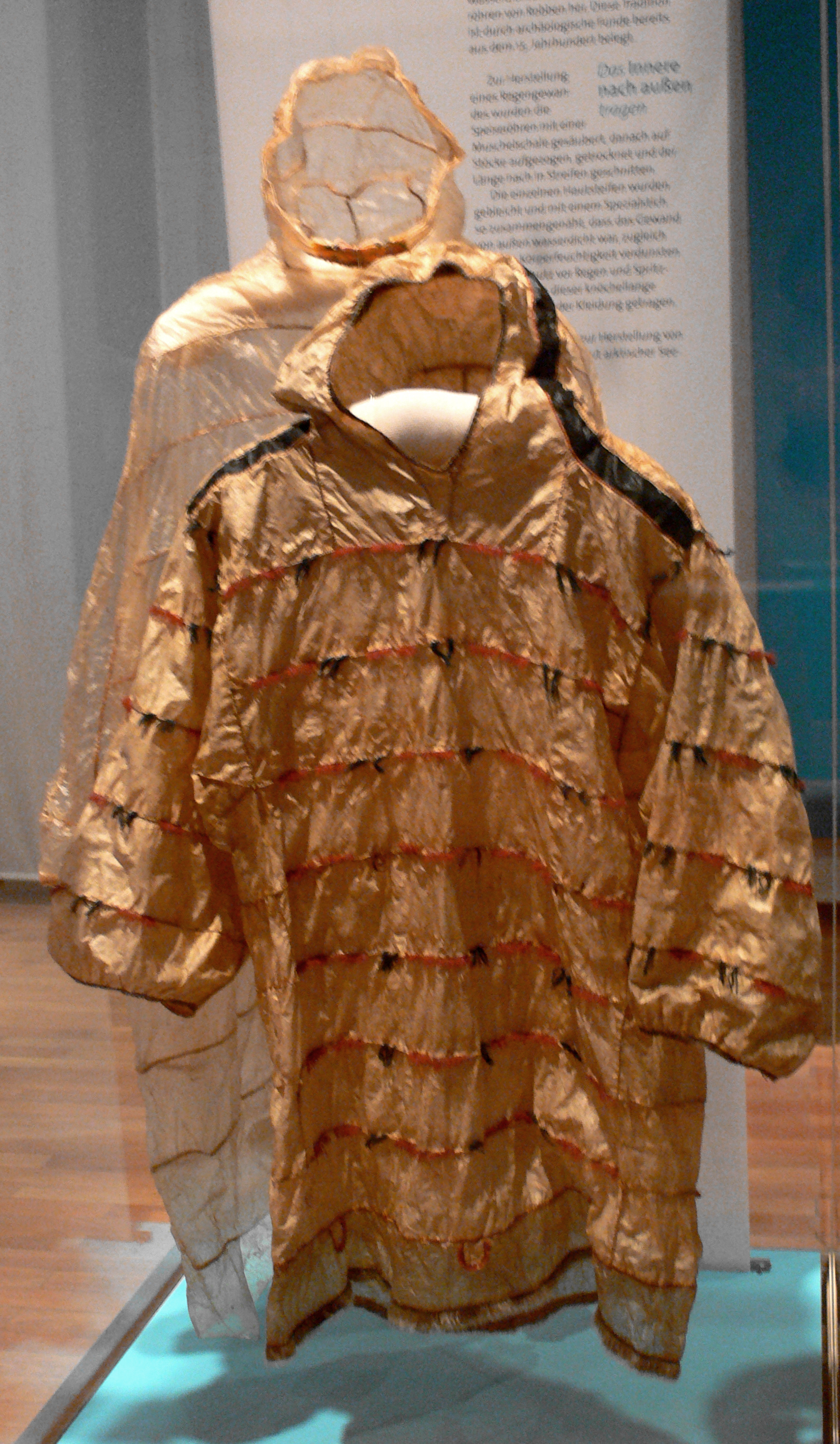 Stuttgart, Linden-Museum hinten: Parka aus Robbendarm, Ostarktis, um 1900 vorne: Parka aus Robbendarm, Alaska, um 1900 (verziert mit roten und schwarzen Wollfäden)